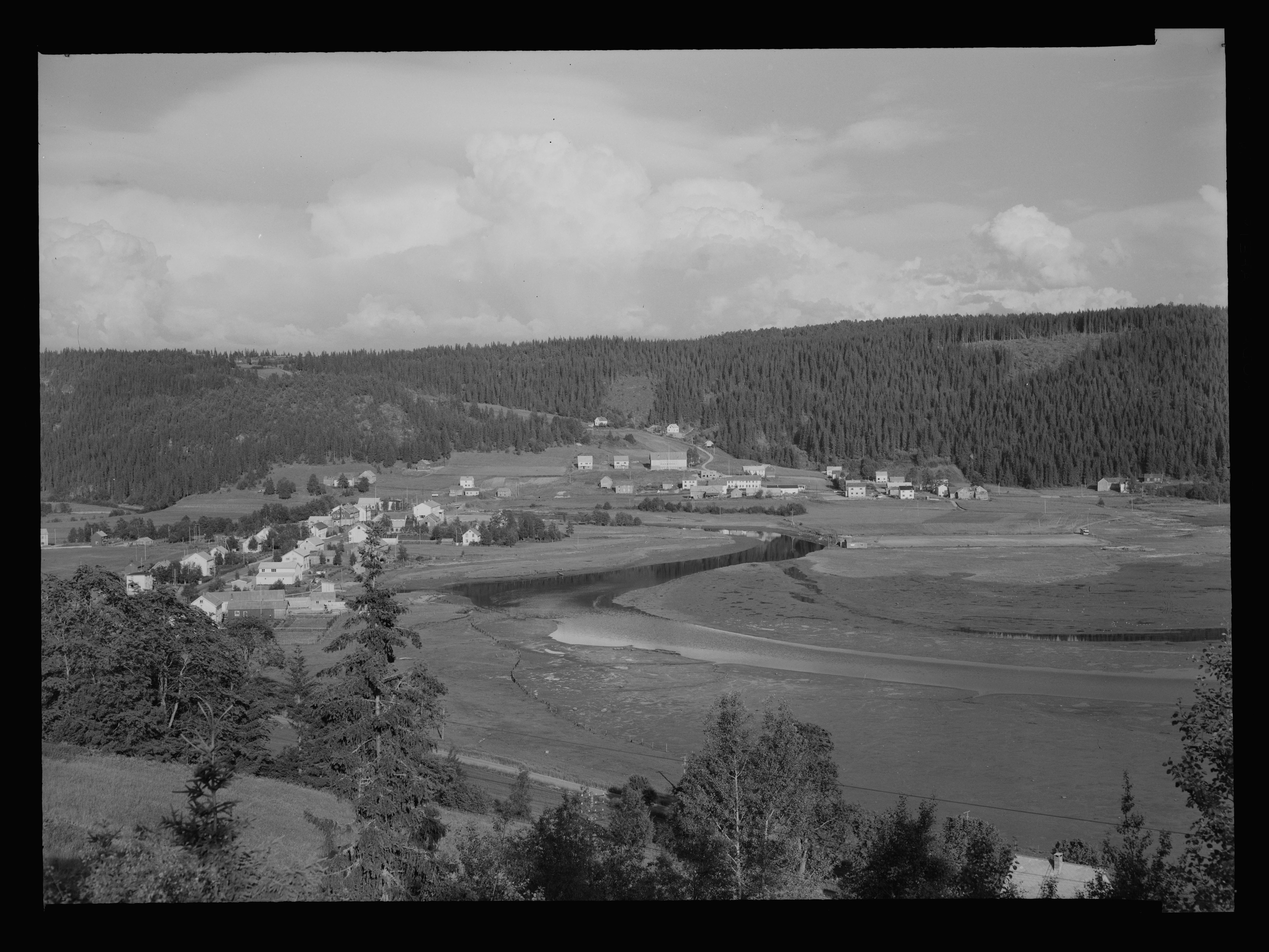 Bildet er hentet fra Nasjonalbibliotekets bildesamling. Anmerkninger til bildet var: Fotograf: L.S Beitstad, Steinkjer, Nord Trøndelag